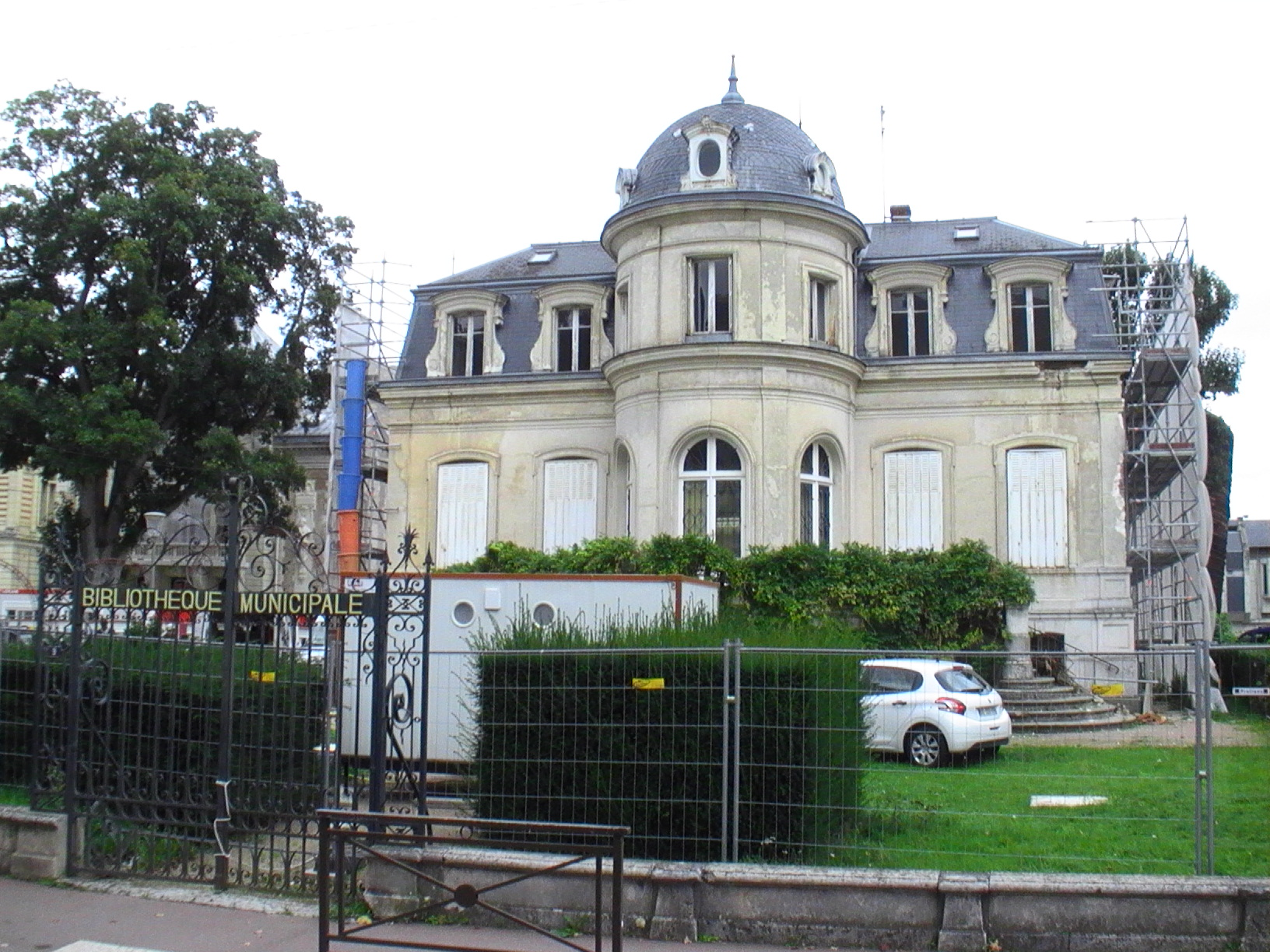 Tournée à Evreux - automne 2017.